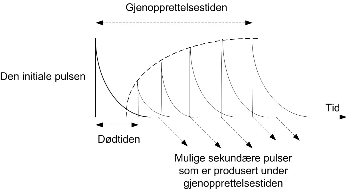 GM-rørets dødtid